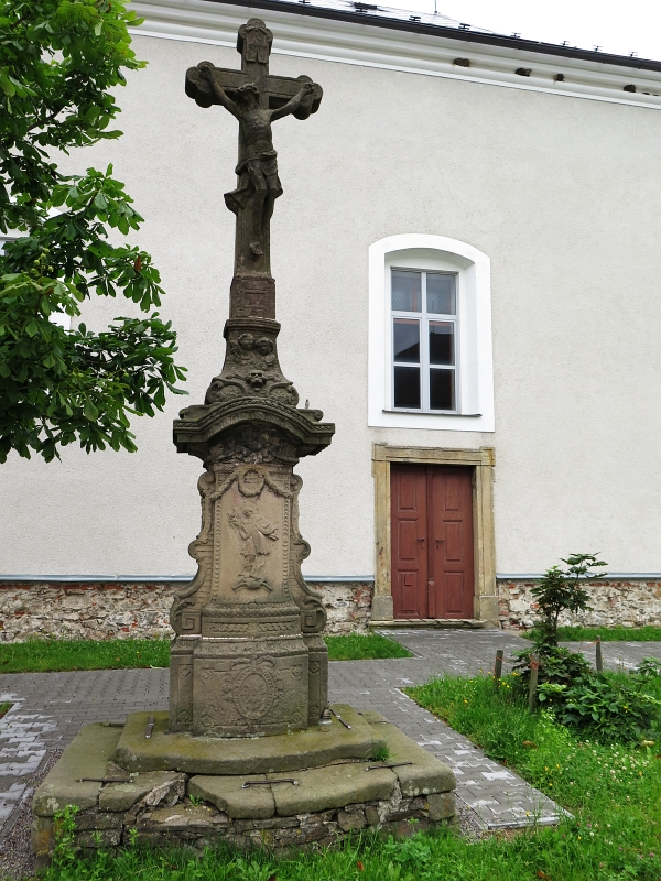 Krucifix, před kostelem, Cotkytle.